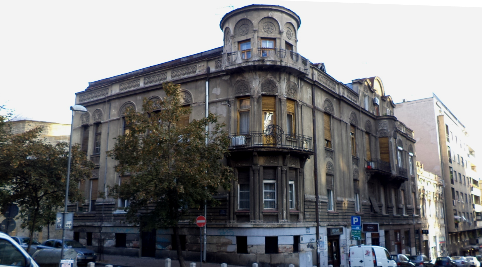 Кућа Михаила Ђурића